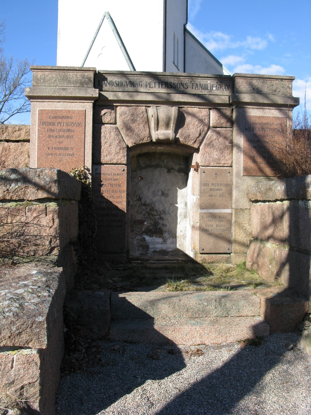 Fredrik Emil Petterssons familje gravkammare